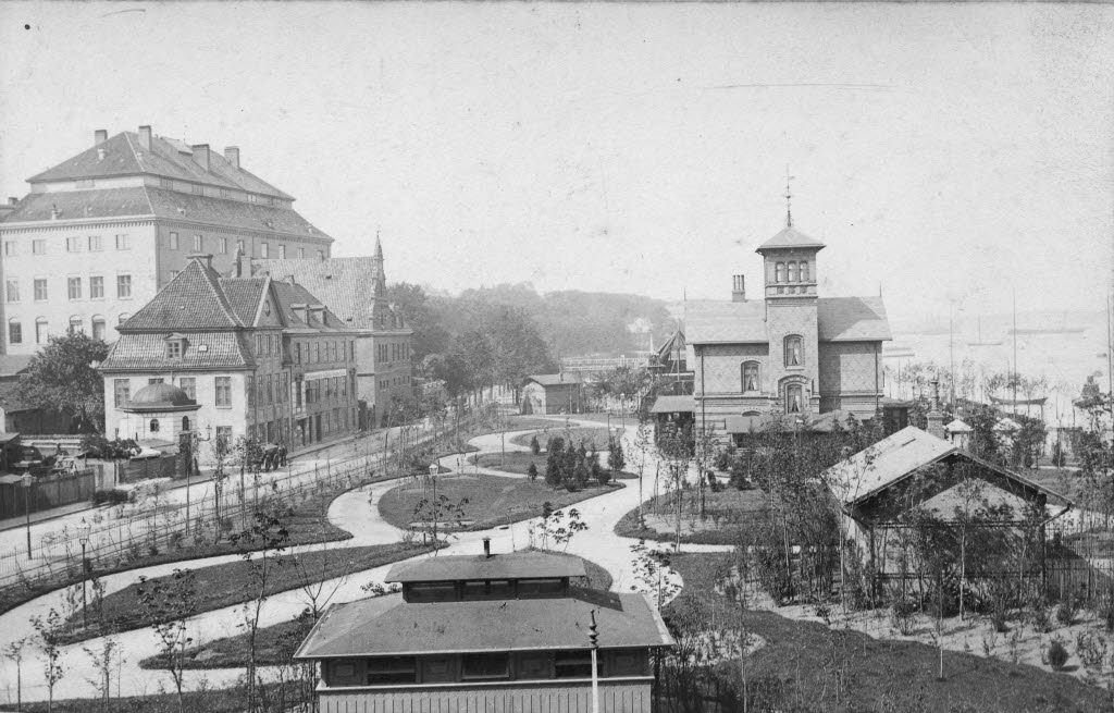 Im Hintergrund links das Schloss, davor der Marstall am Wall.